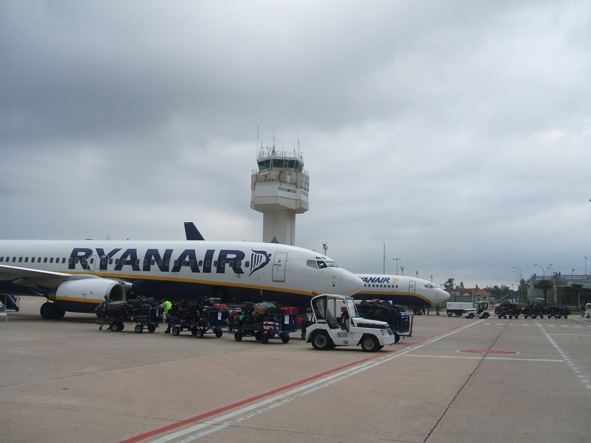 Girona-Costa Brava Airport - Spain